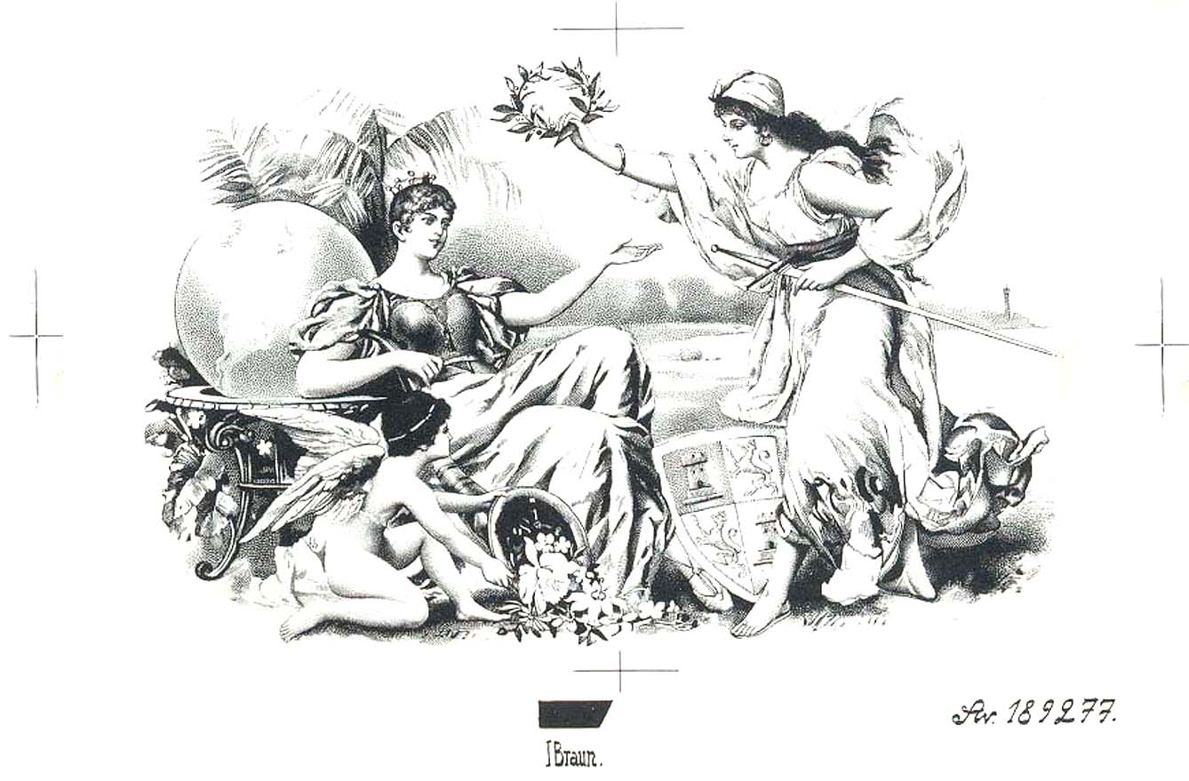 Chromolithografie, Vorlage für Platte "Braun" mit Passkreuzen